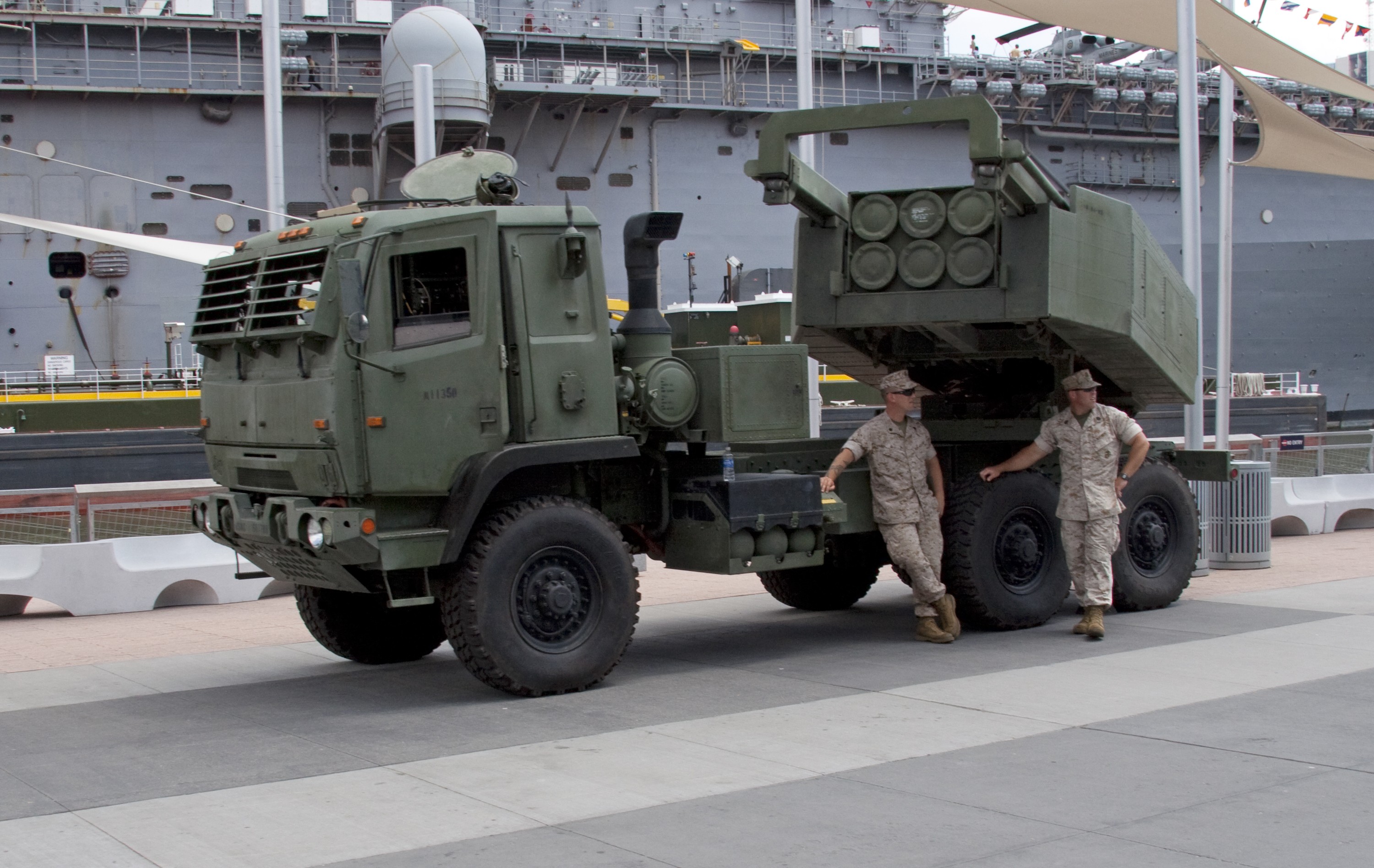 Missile Truck